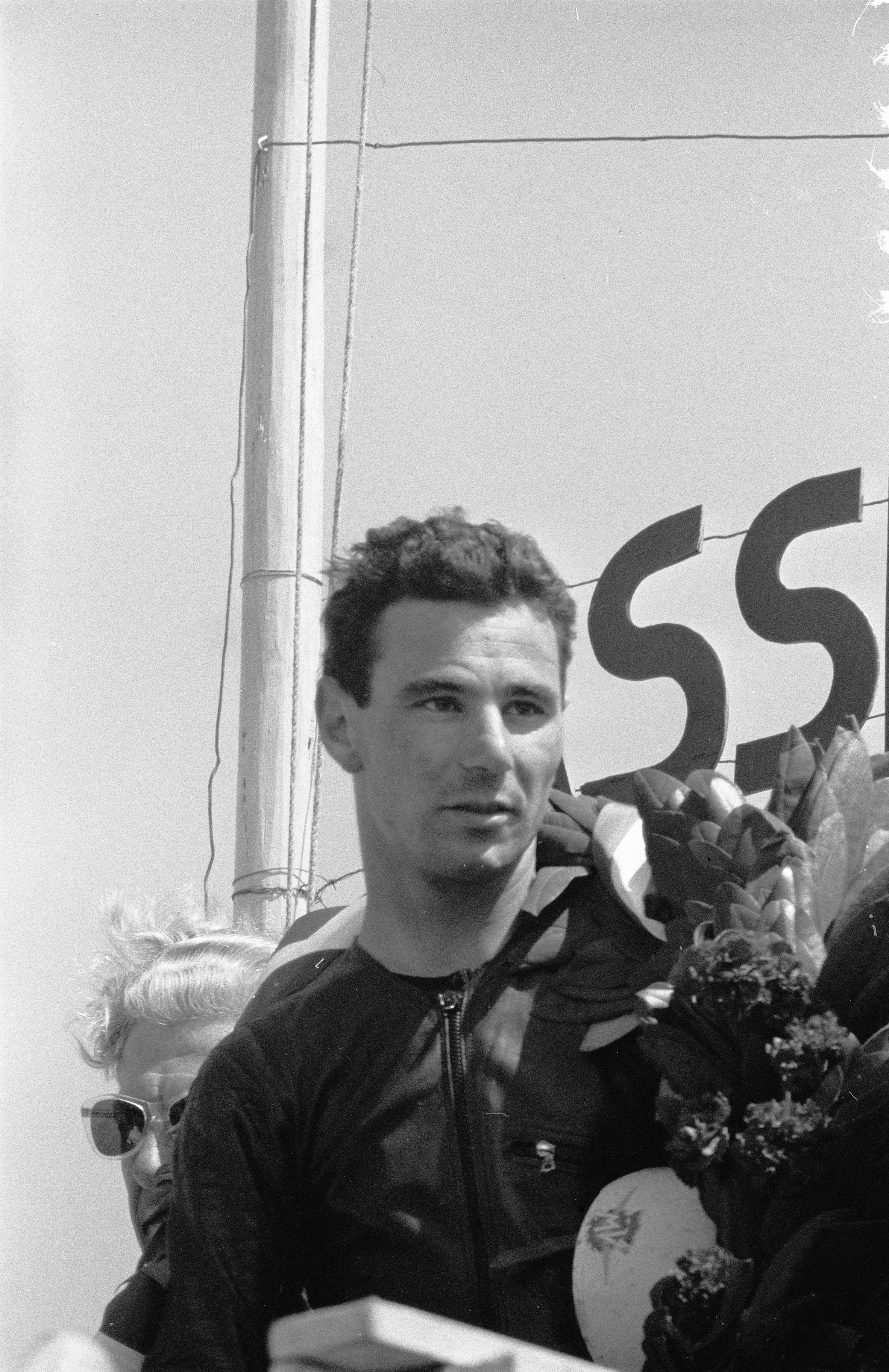 Collectie / Archief : Fotocollectie Anefo Reportage / Serie : TT Assen 1960 Beschrijving : Huldiging Carlo Ubbiali (winnaar 125cc en 250cc) Datum : 26 juni 1960 Locatie : Assen Trefwoorden : motorsport Persoonsnaam : Ubbiali, Carlo Instellingsnaam : TT Fotograaf : Bilsen, Joop van / Anefo Auteursrechthebbende : Nationaal Archief Materiaalsoort : Negatief (zwart/wit) Nummer archiefinventaris : bekijk toegang 2.24.01.05 Bestanddeelnummer : 911-3659